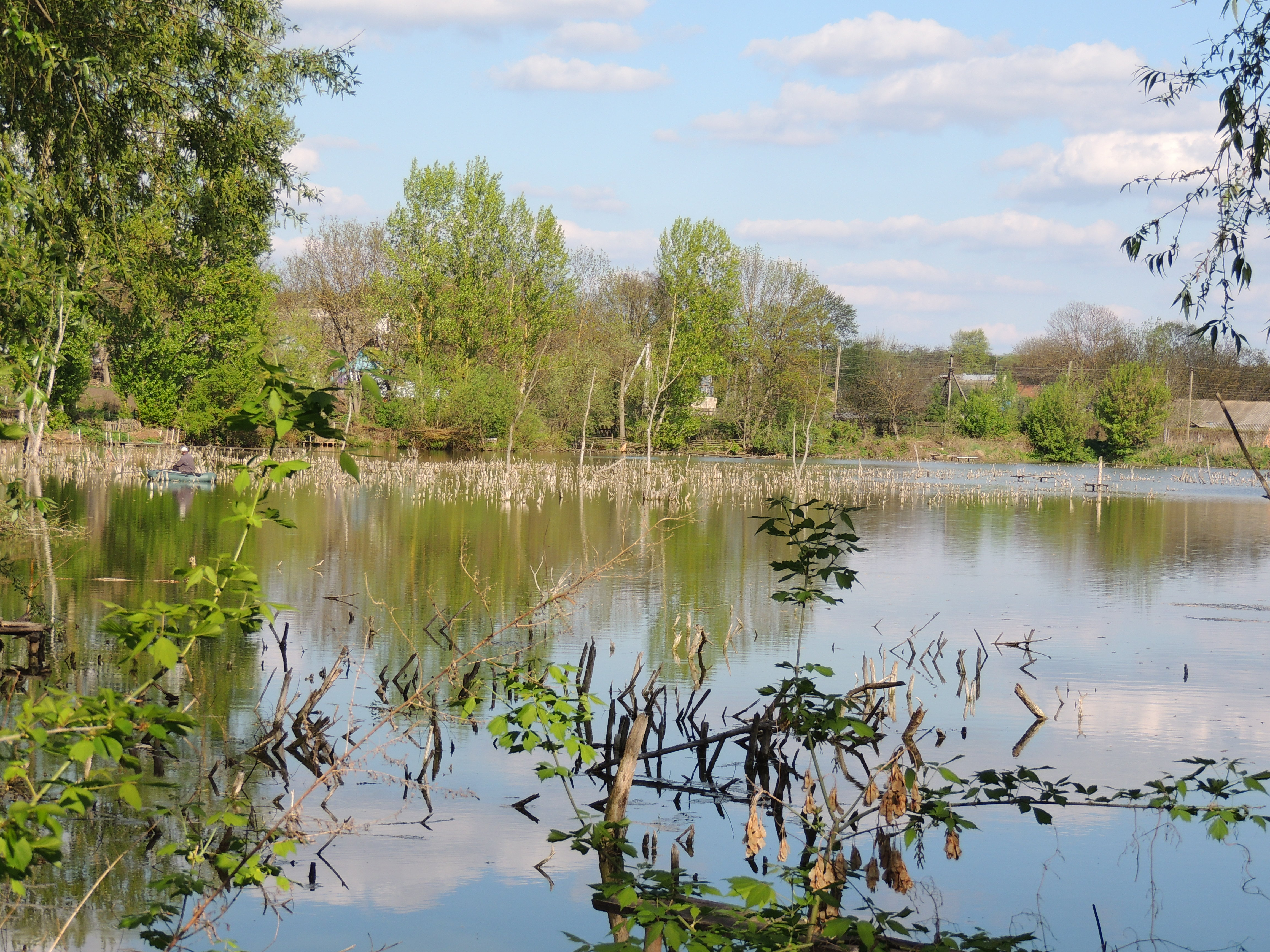 Це фото.